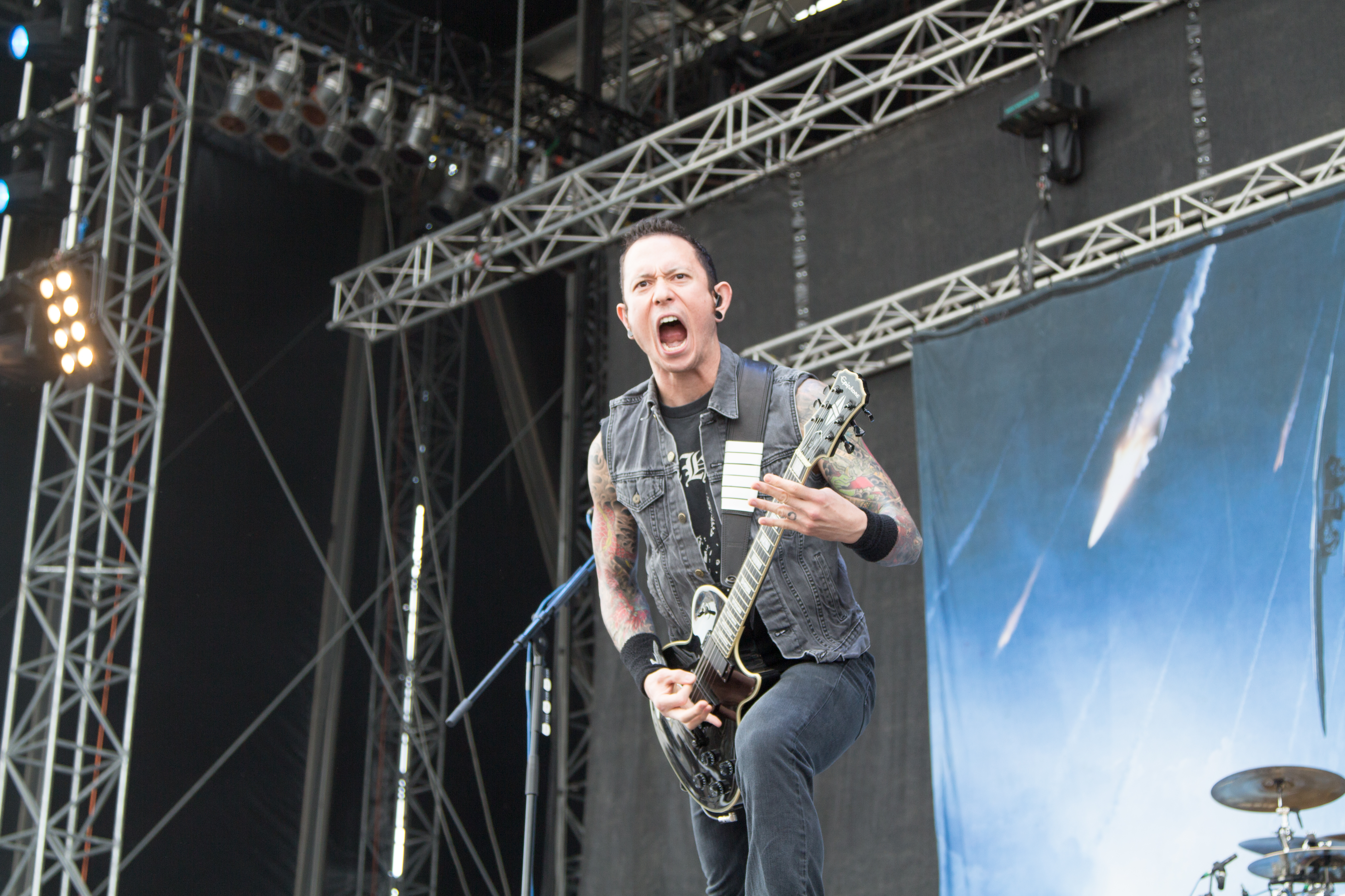 Matt Heafy from Trivium at Nova Rock 2014